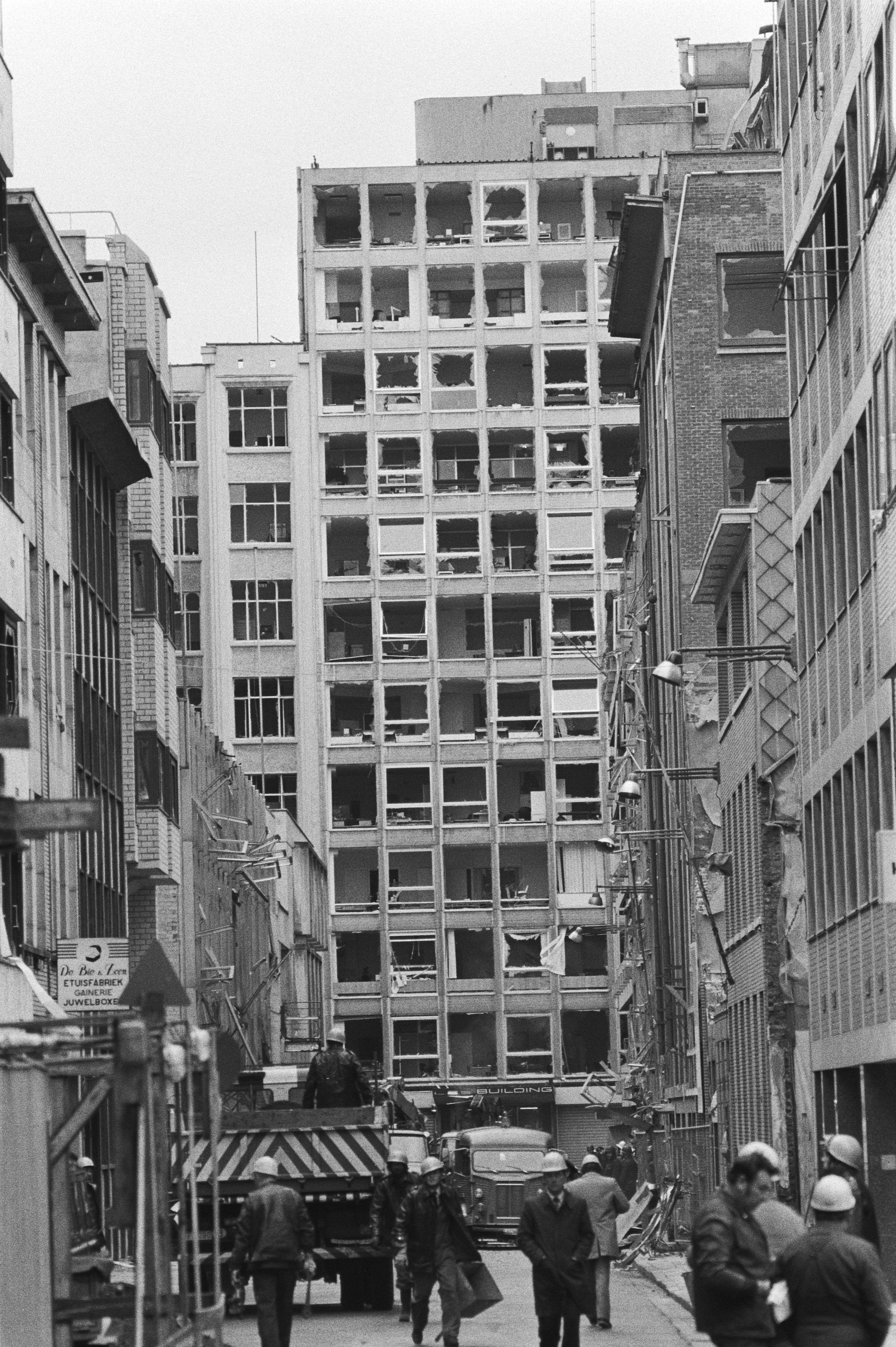 Collectie / Archief : Fotocollectie Anefo Reportage / Serie : Bomaanslag in de Joodse wijk van Antwerpen Beschrijving : Beschadigde gebouwen in de Hoveniersstraat na de aanslag Datum : 20 oktober 1981 Locatie : Antwerpen, België Trefwoorden : beschadigingen, gebouwen Fotograaf : Antonisse, Marcel / Anefo Auteursrechthebbende : Nationaal Archief Materiaalsoort : Negatief (zwart/wit) Nummer archiefinventaris : bekijk toegang 2.24.01.05 Bestanddeelnummer : 931-7513